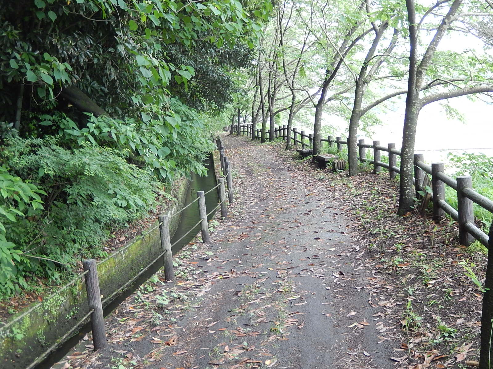 世界遺産推薦物件「明治日本の産業革命遺産群」構成資産、旧集成館・関吉の疎水溝